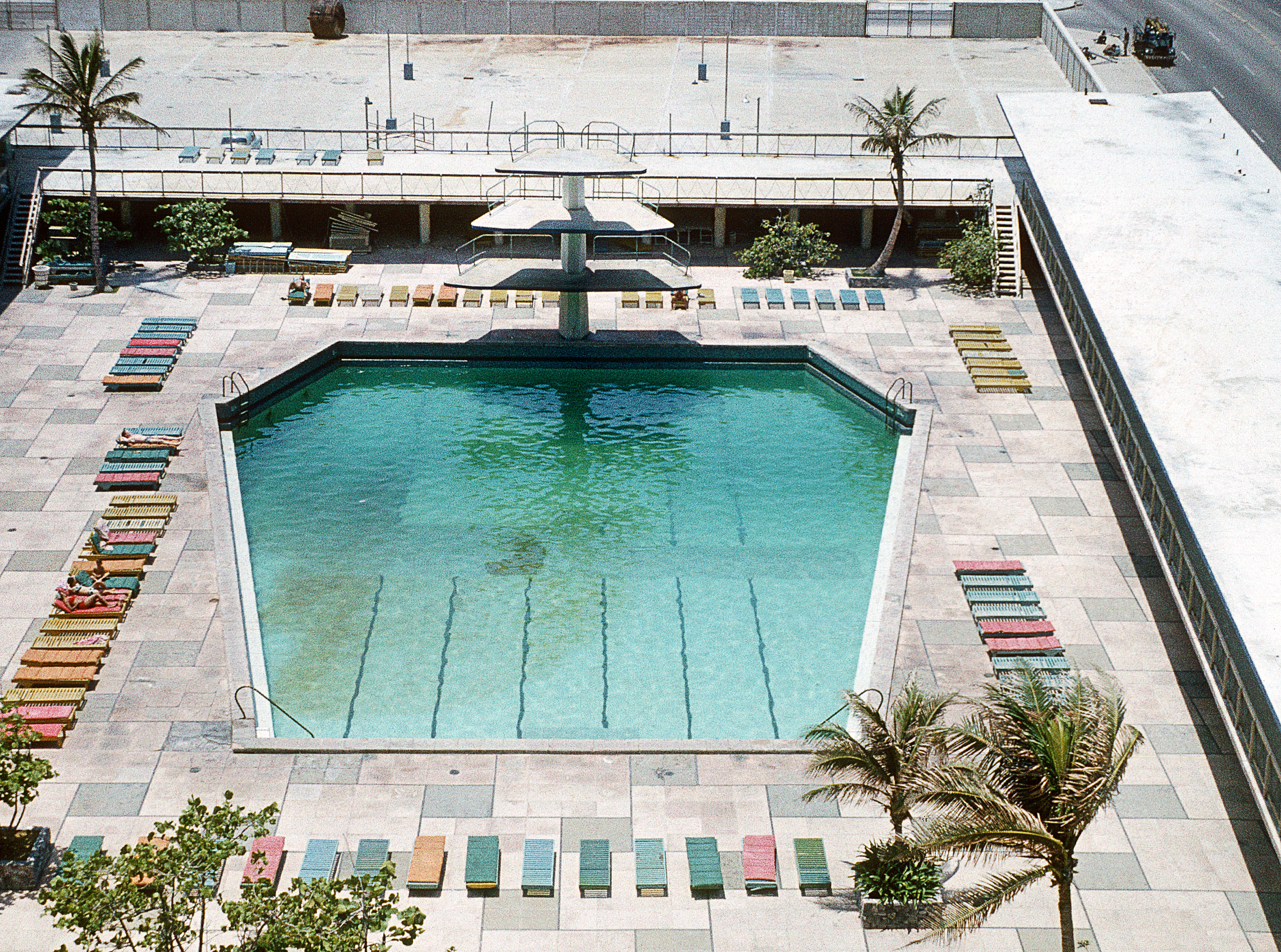 Havanna 1973; Hotel Riviera